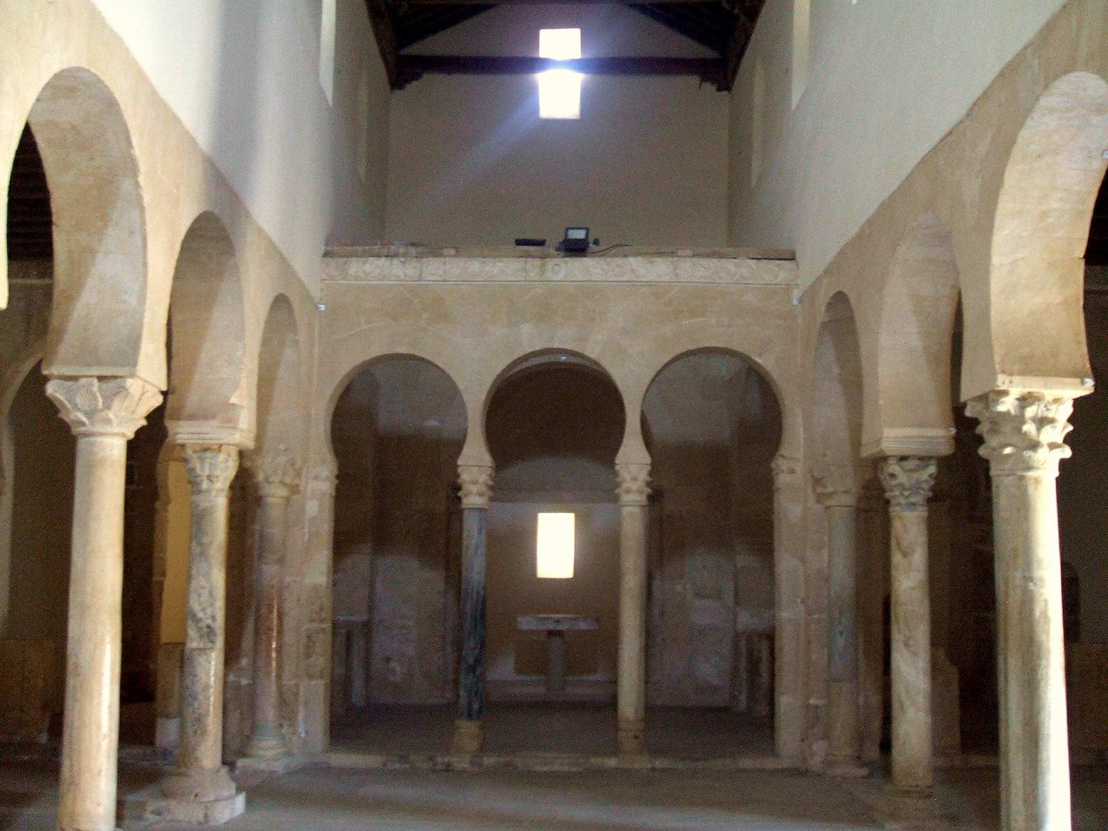 Monasterio mozárabe de San Miguel de Escalada (León).